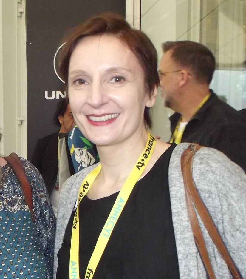 Nora Twomey au festival international du film d'animation d'Annecy 2018